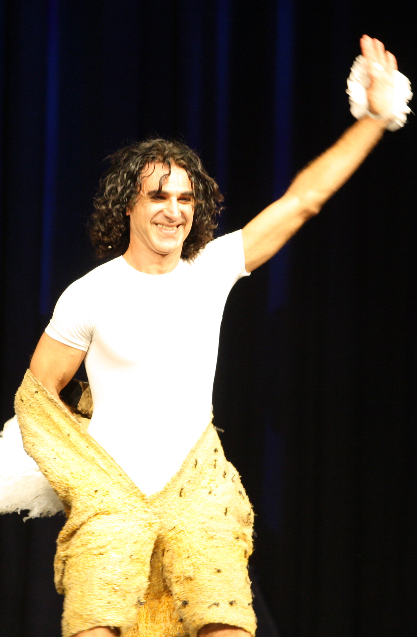 Le Mime Daniel, hier während seines Aufritts am 23.01.2012 auf der Freiburger Kulturbörse (Opening, Theatersaal 1)